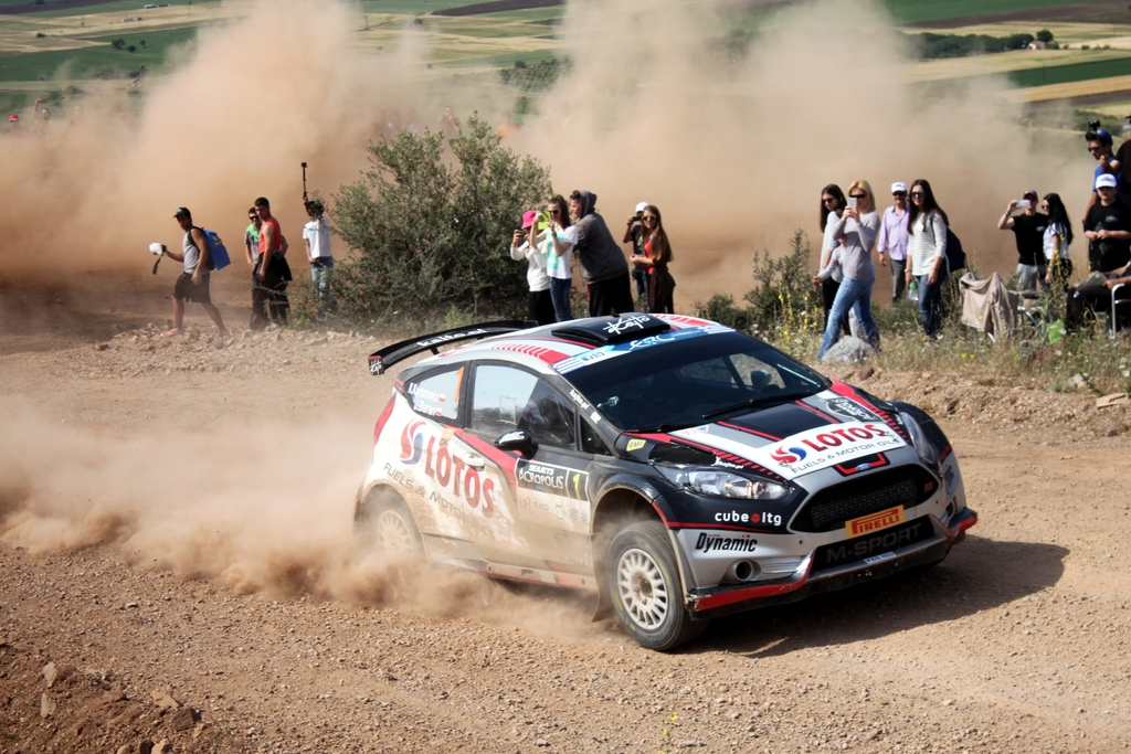 Kajetan Kajetanowicz podczas 62 Rajdu Akropolis Grecji 2016